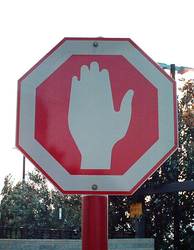 he:תמרור עצור. צילום שלי, חופשי לכל שימוש.